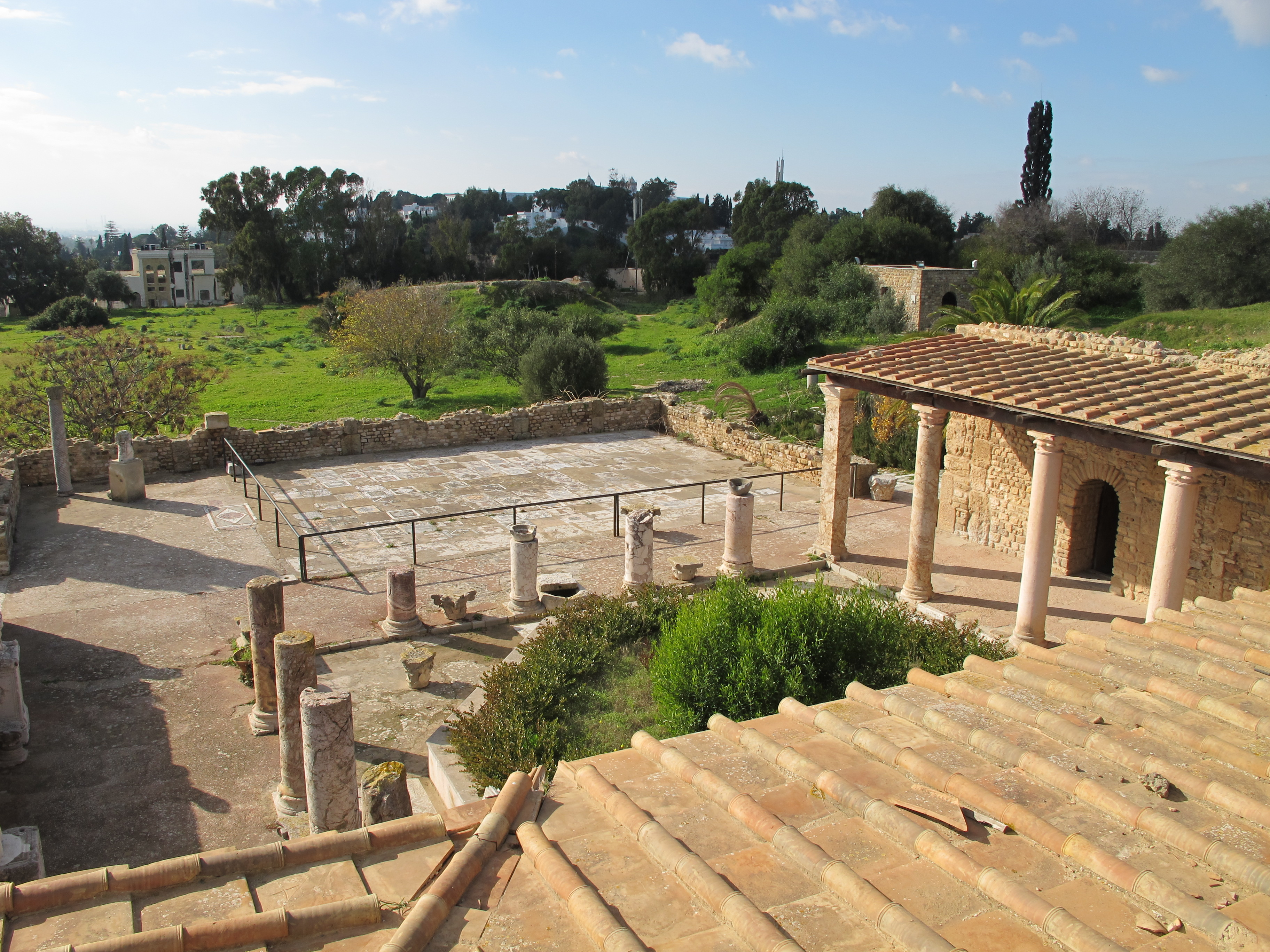 House of the Aviary, Roman villas of Carthage